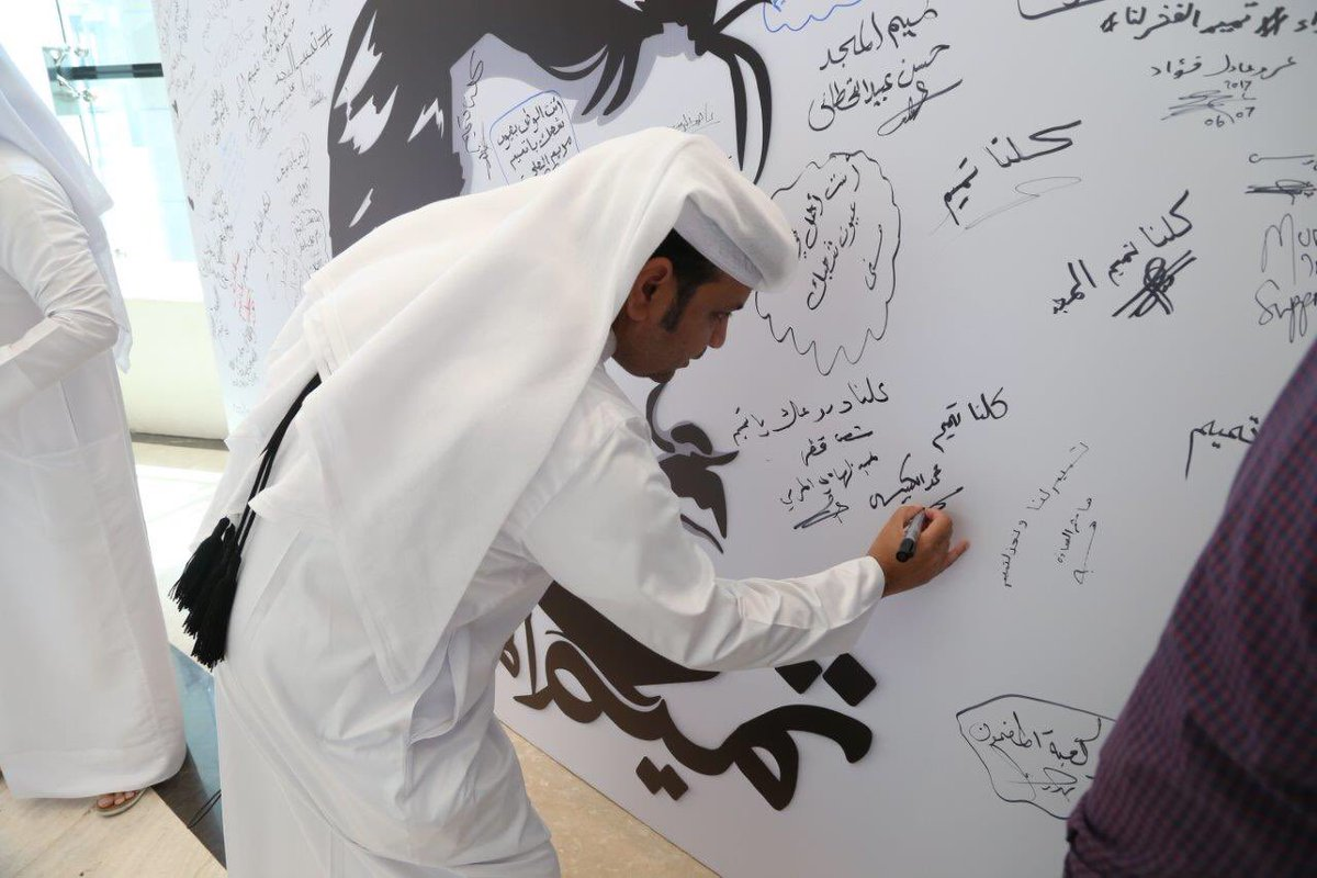 بدأ القطريون في استخدامها كنوع من اظهار الدعم لحاكمهم